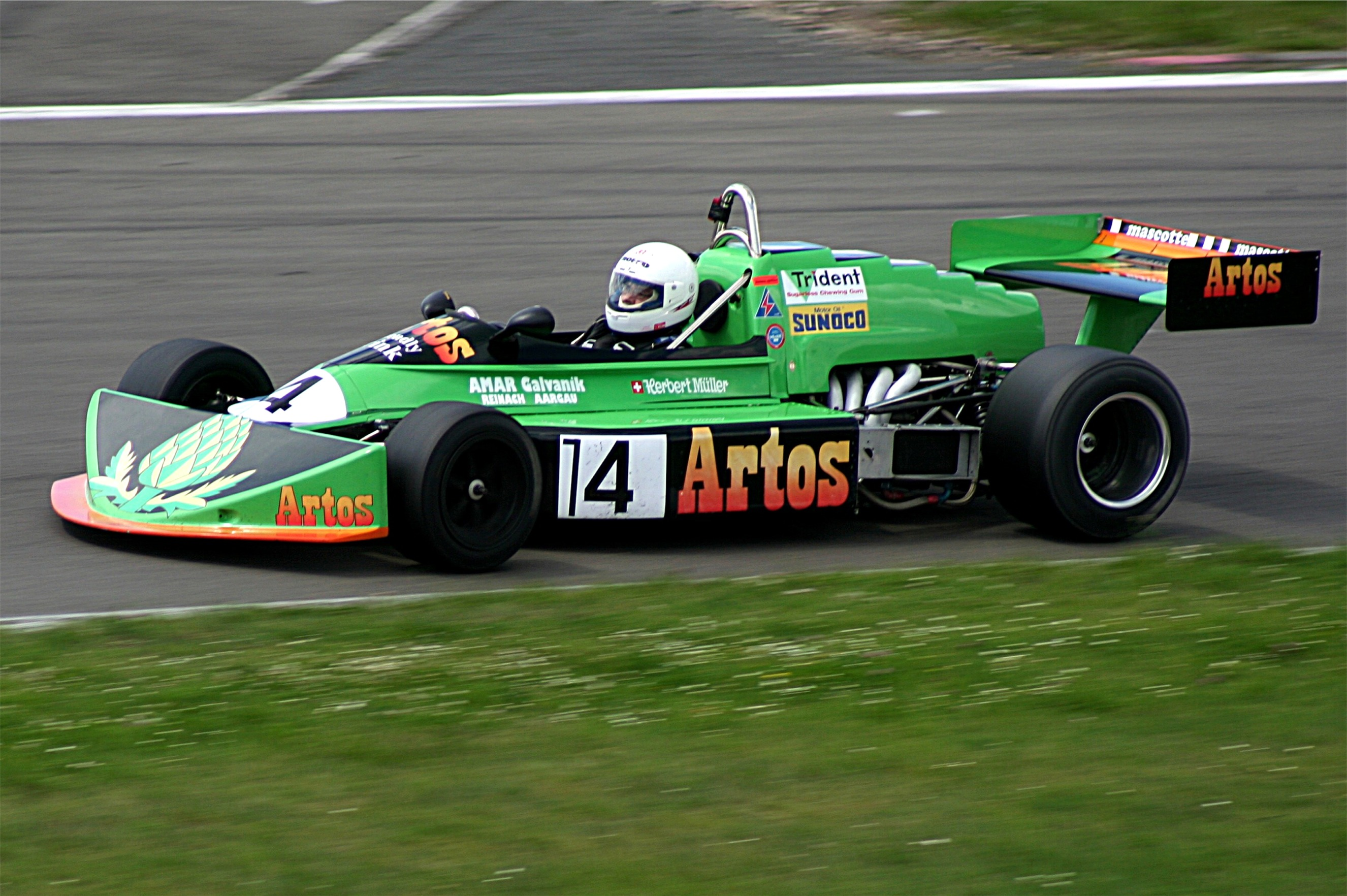 March 752, Formel-2-Wagen von 1975, ehemals Herbert Müller